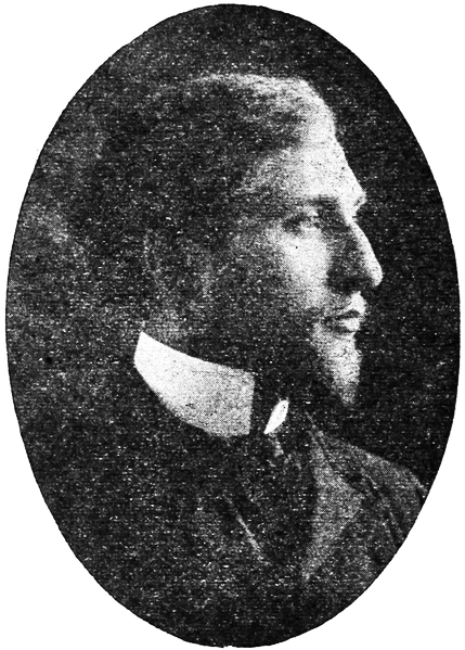 portret Karola Wahtla